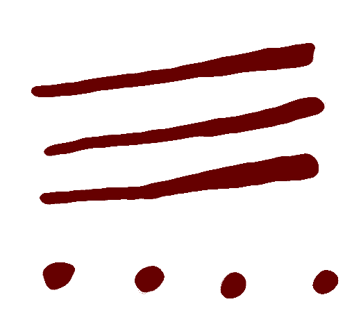 Ideomorfos tipo bastoncillo y puntuaciones del panel número 60, de la Galería B (segundo santuario) de la Cueva de La Pasiega, en el monte Castillo, localidad de Puente Viesgo (Cantabria, España)